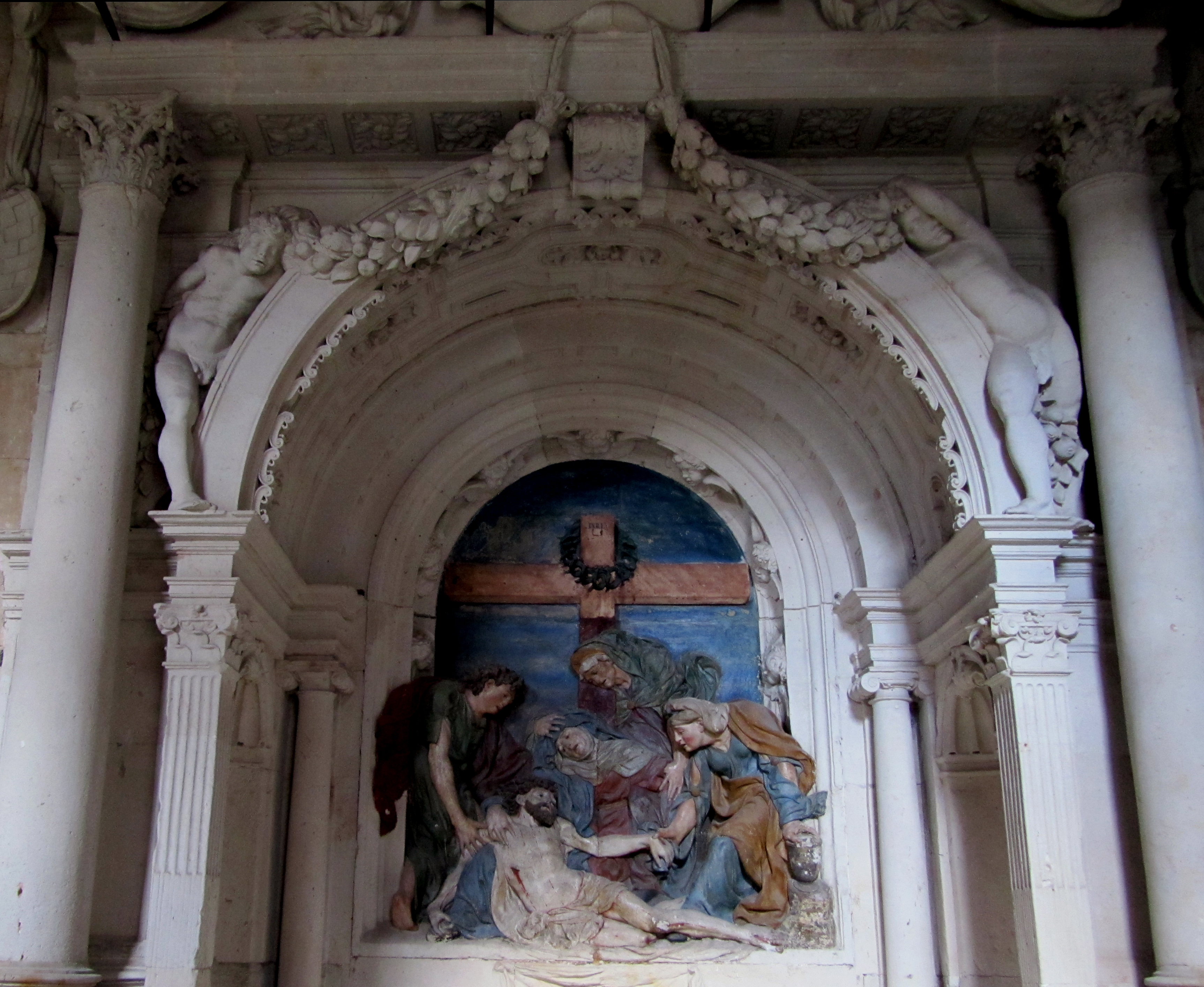 Sepulcro del arcediano Gutierre de Castro en piedra arenisca policromada realizada por el escultor Juan de Juni y conservado en el claustro de la catedralvieja de Salamanca.